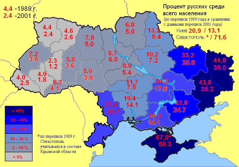 Процент русских среди всего населения по данным переписи 1989 года в сравнении с данными переписи 2001 года